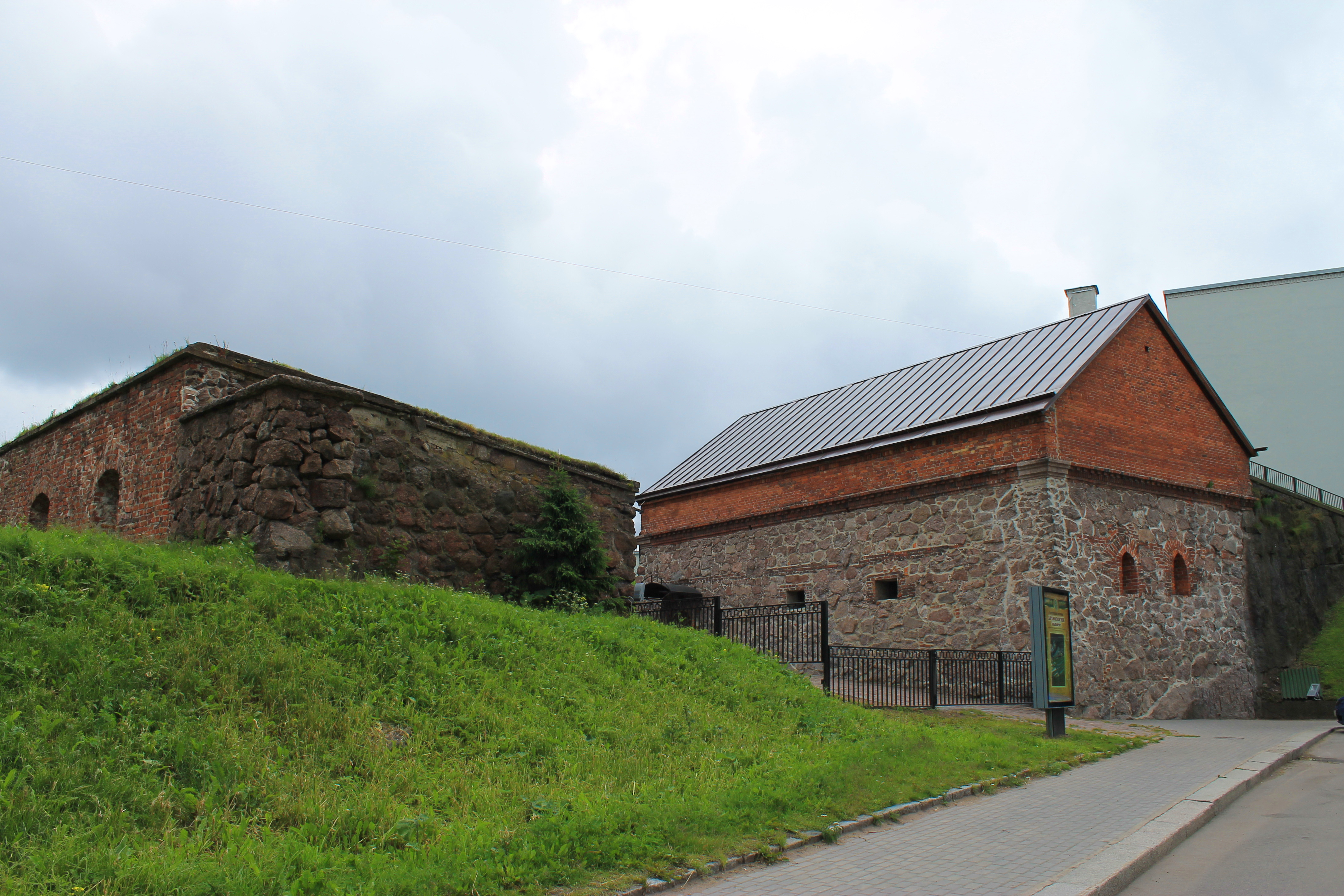 Бастион Панцерлакс (Пантсерлакс) (Лен.область, Выборг, улица Лужская, 1)